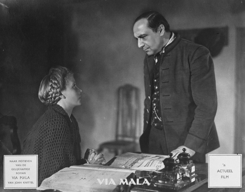 Actueel film repros Via Mala: Karin Hardt en Carl Kuhlmann